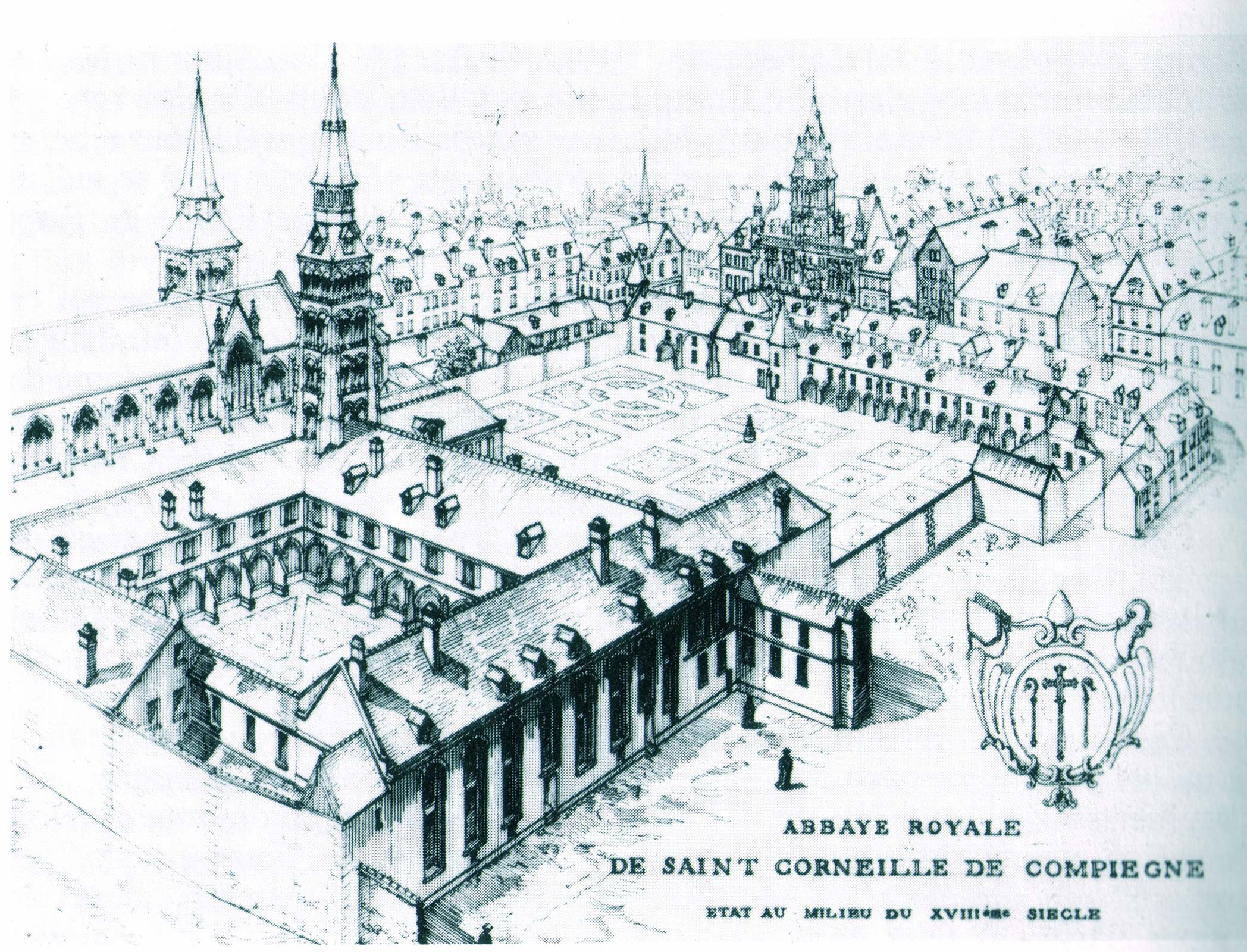 Abbaye Saint-Corneille Famille Mottet Picardie